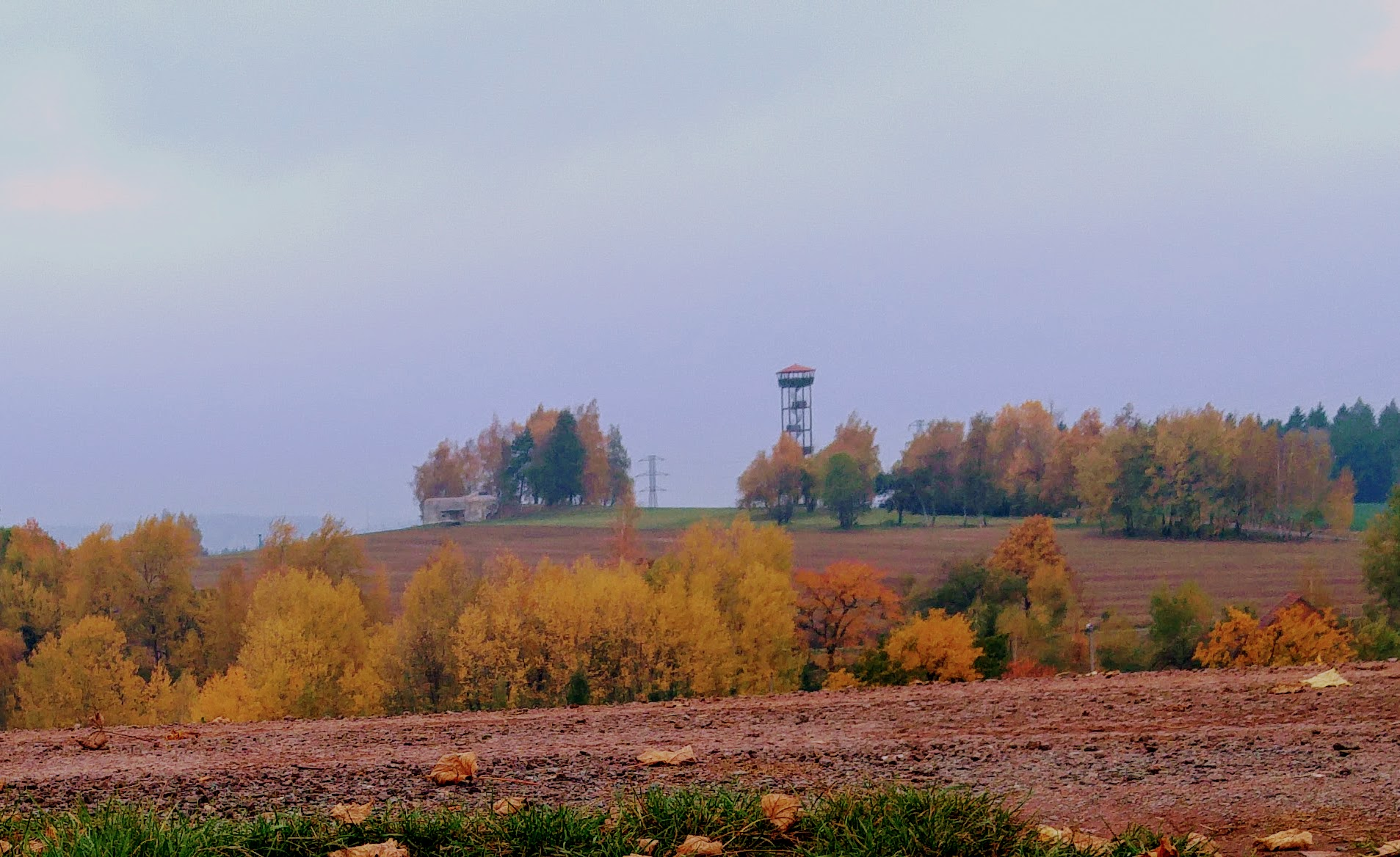 Vrch Signál v Červenokostelcké pahorkatině